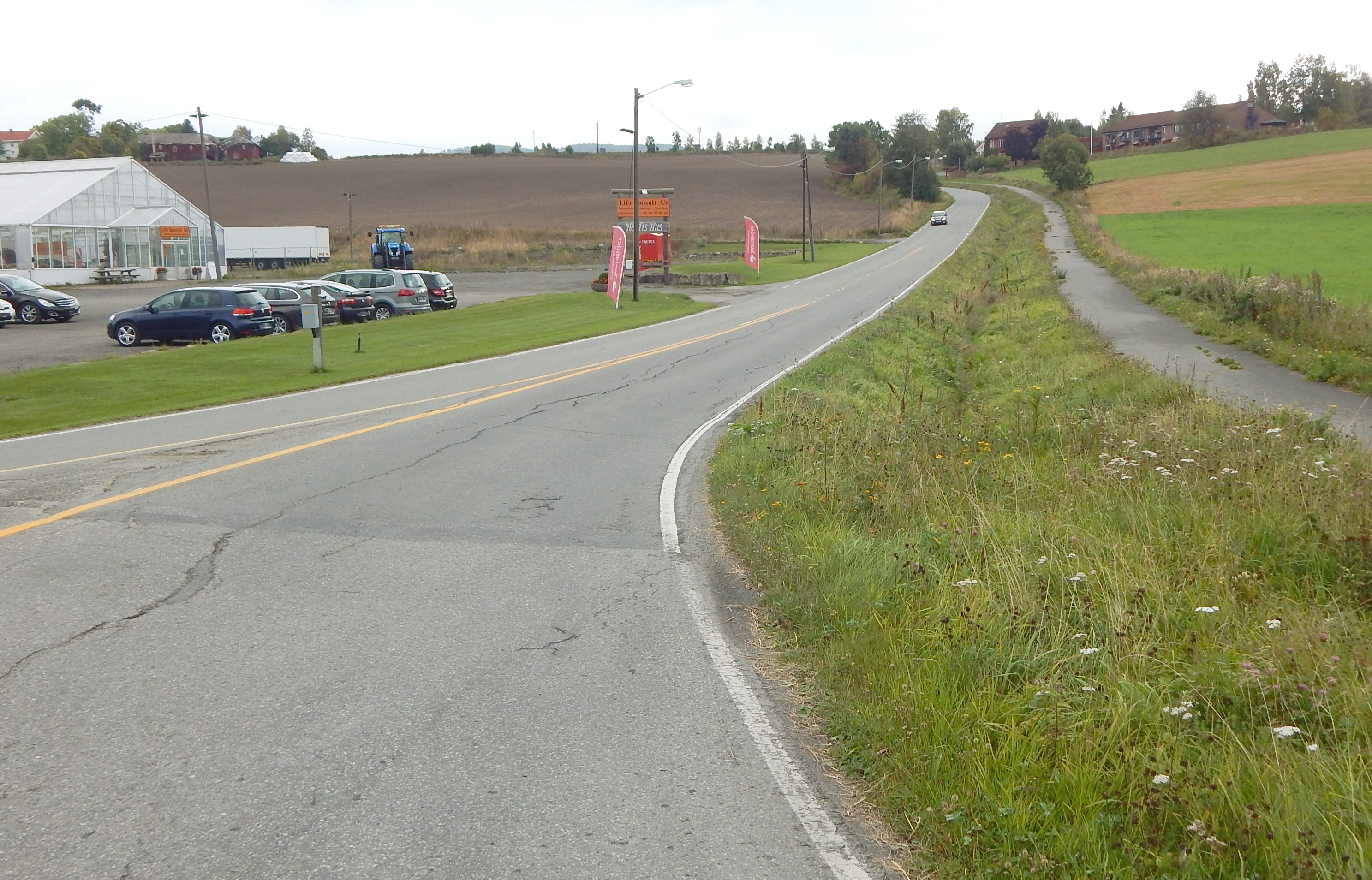 Høsbjørvegen (fylkesvei 1722, tidl. 56) sett fra Furnesvegen